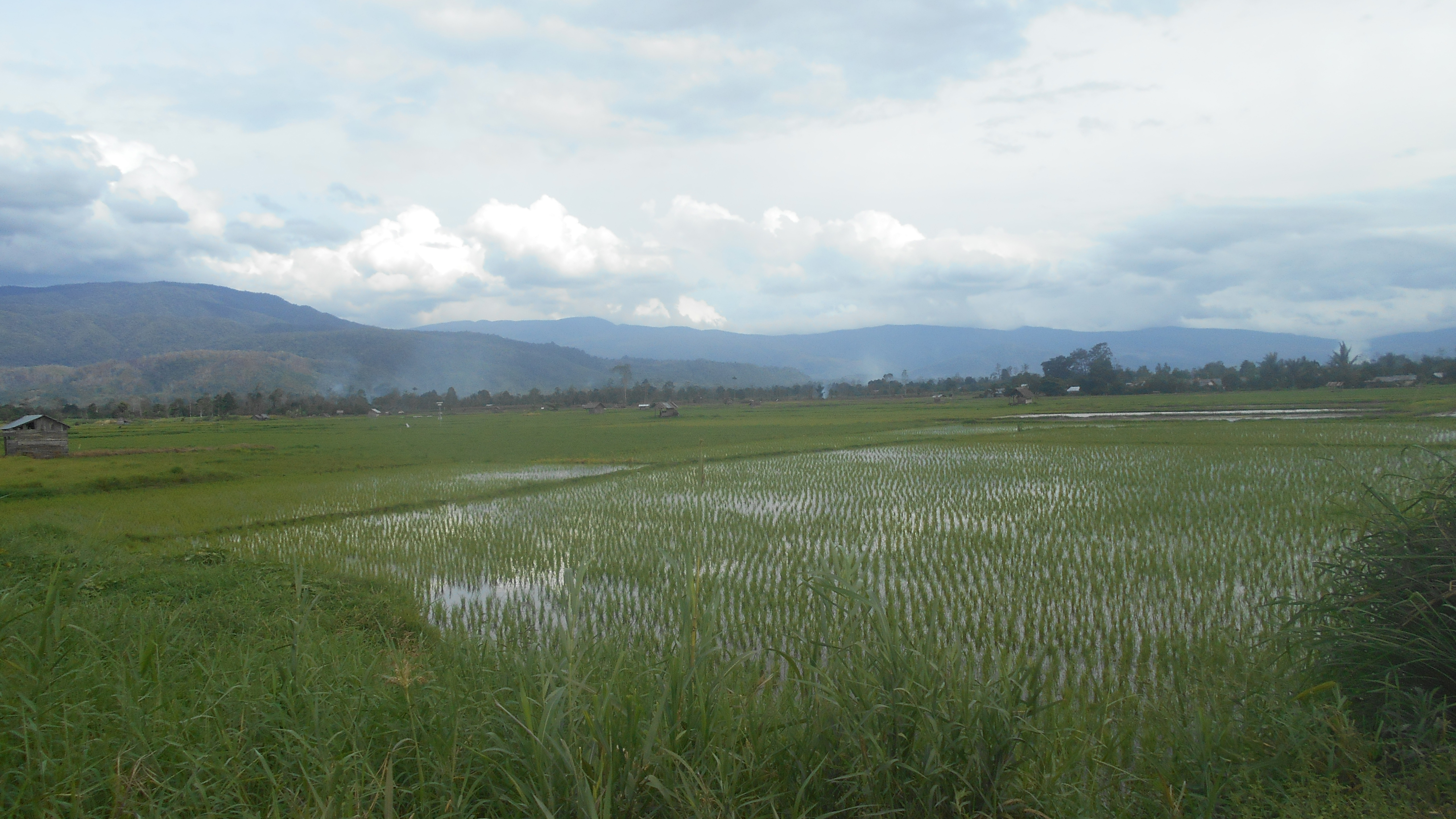 Wuasa terletak di lembah napu yang di kelilingi oleh perbukitan dan gunung, tepatnya berada di kec. lore utara, kab. poso, sulawesi tengah